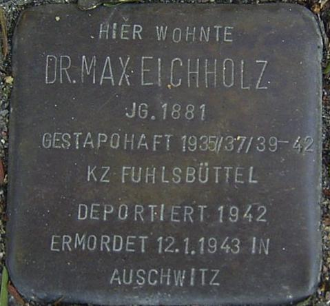 Stolperstein zum Andenken an den liberalen Politiker Max Eichholz (1881 - 1943) vor seinem Wohnhaus im Mittelweg 89 in Hamburg-Harvestehude.